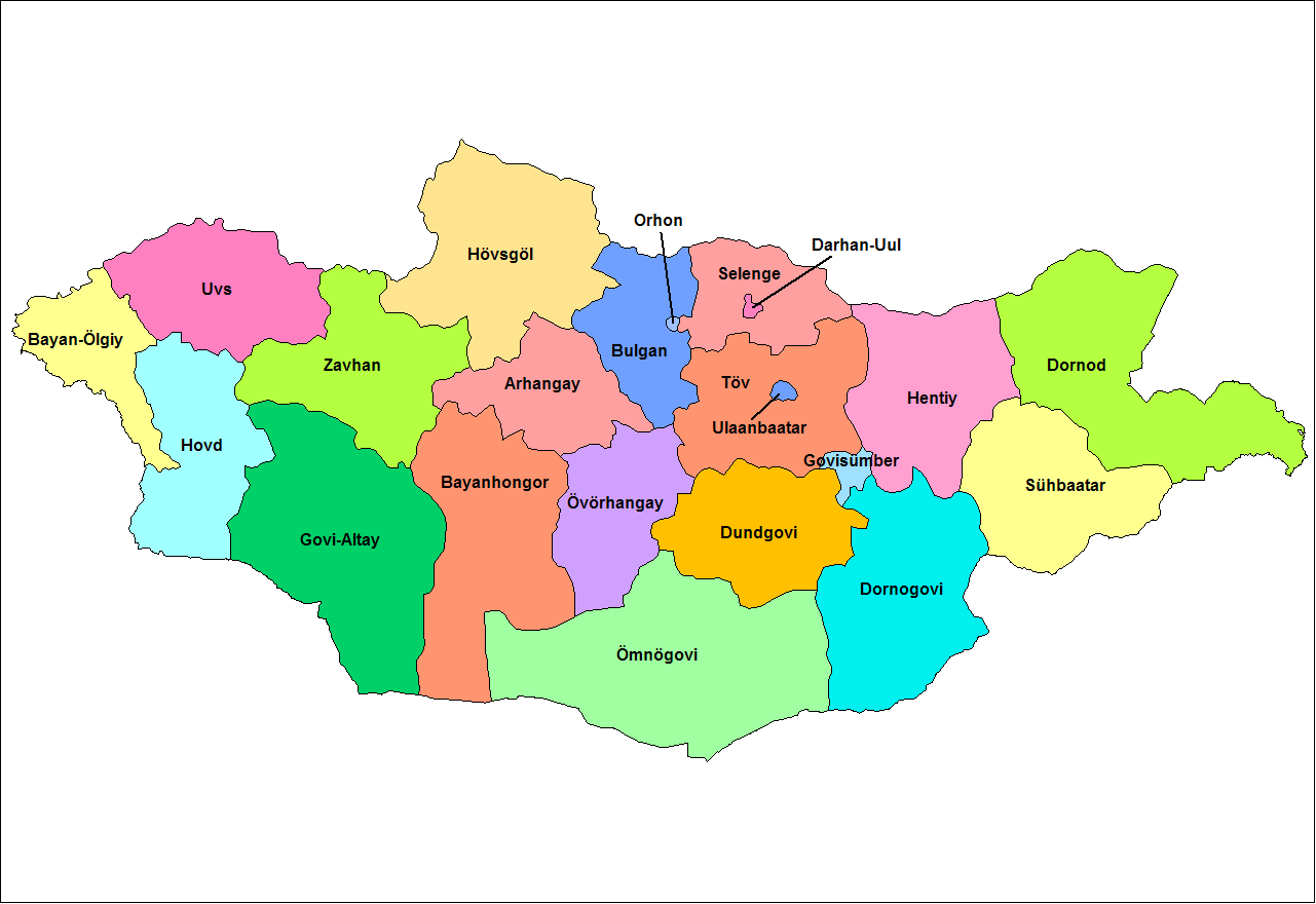 Import depuis Wikipédia Anglaise. Auteur : User:Rarelibra